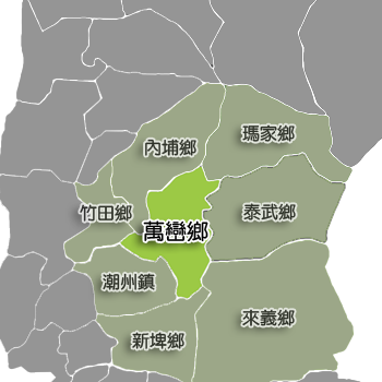 中文（台灣）: 屏東縣萬巒鄉相對位置。